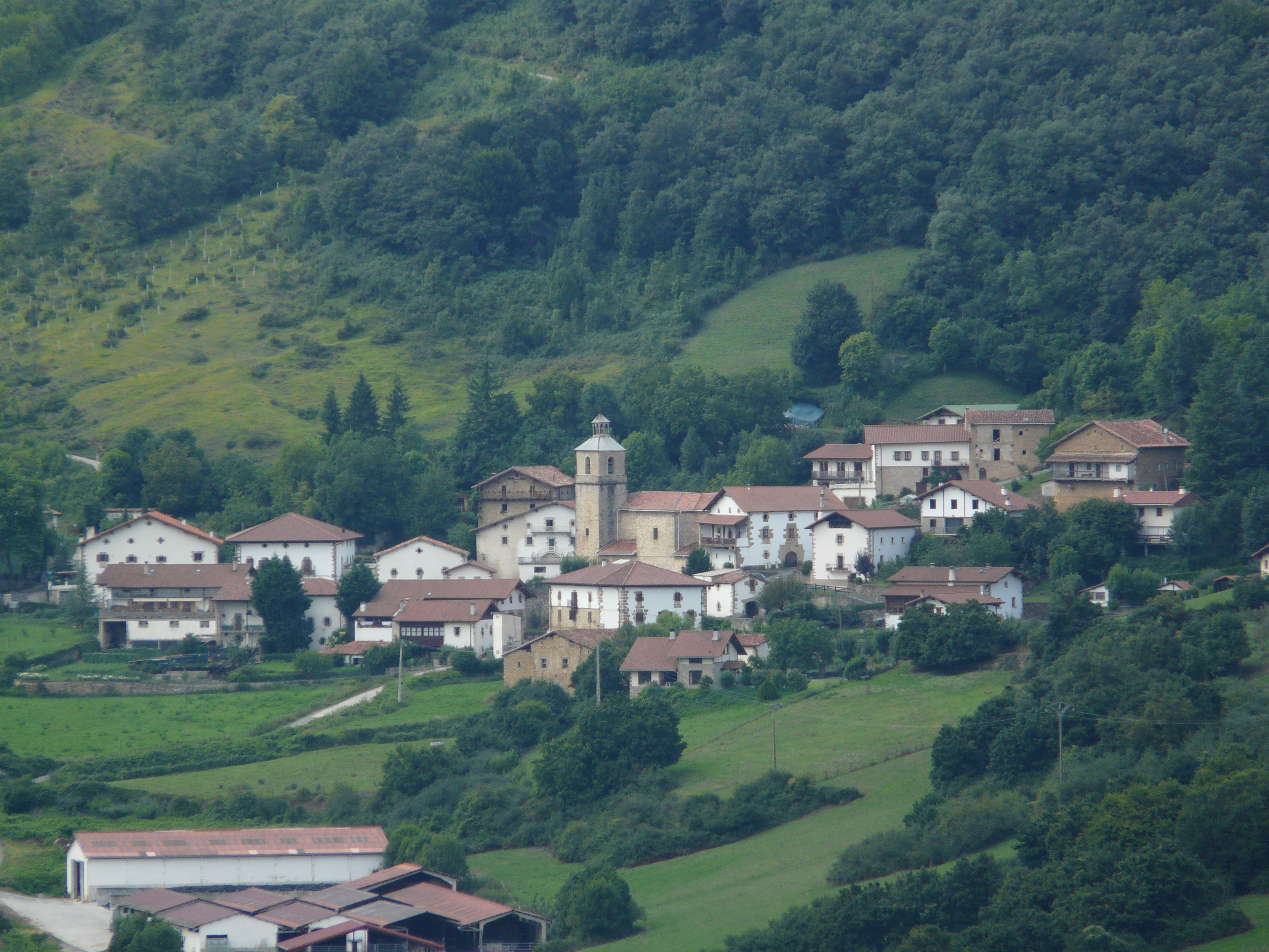 Etxaleku vist des de Zarrants, o des de la carretera que puja a Zarrantz.